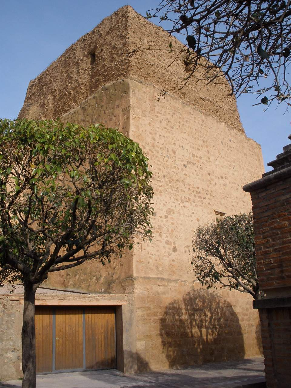 Restos de la muralla de Tarazona